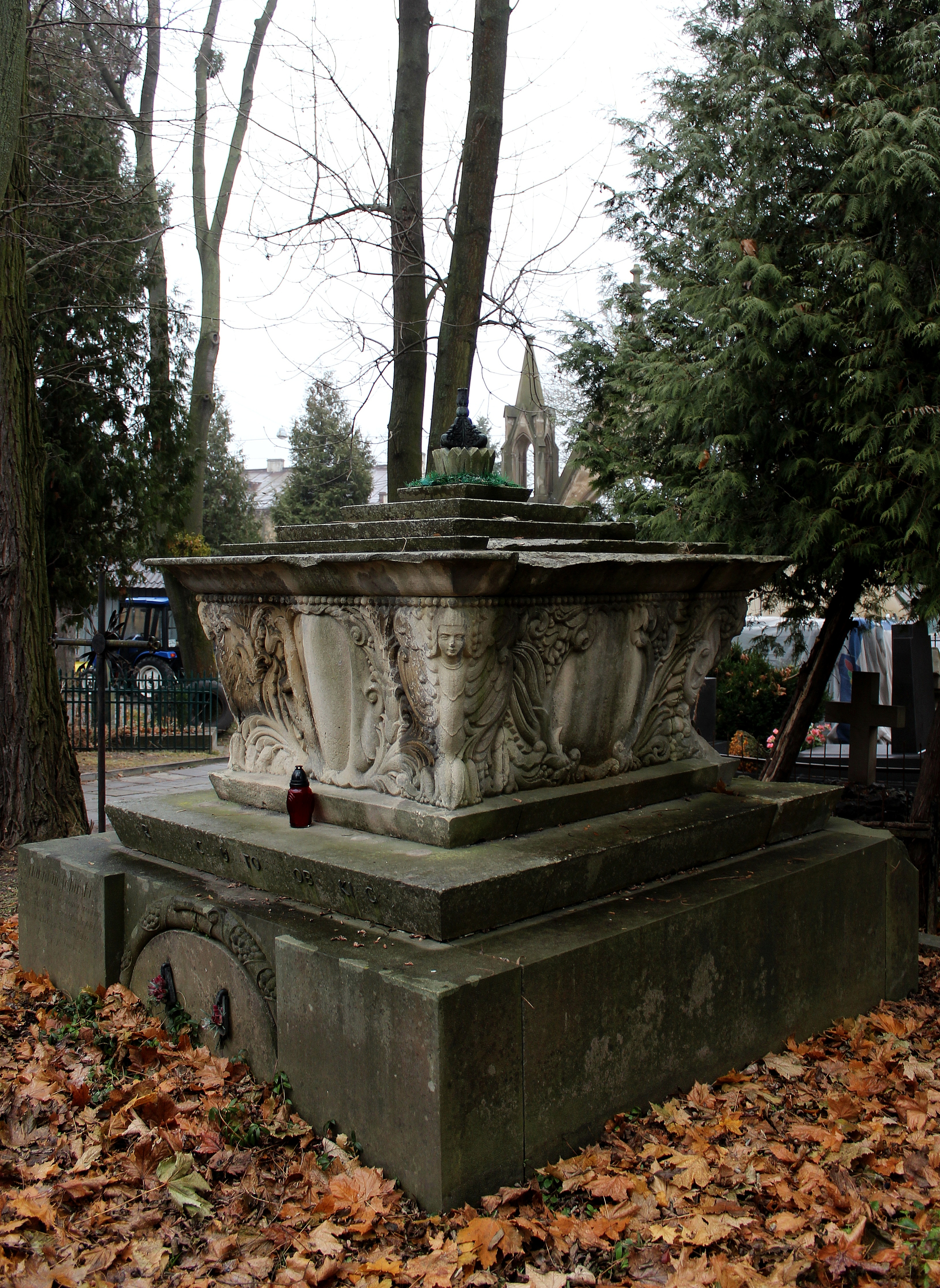 Гробівець родини Собінських. Личаківський цвинтар , поле № 1.